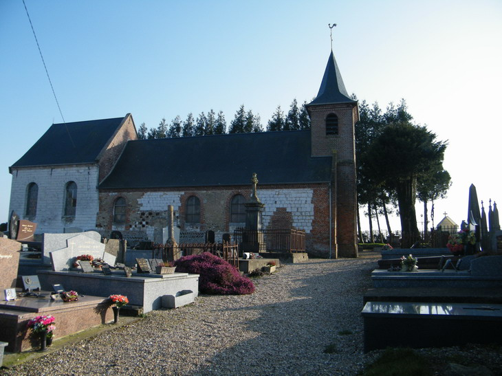 L'église de Vercourt, Somme, France. L'église Saint-Saturnin date du XVIe siècle. Les façades latérales de la nef, objets de nombreuses réparations, sont très hétéroclites. On y voit de la brique, de la pierre (silex ou grès), du torchis et des galets disposés en arête-de-poisson.